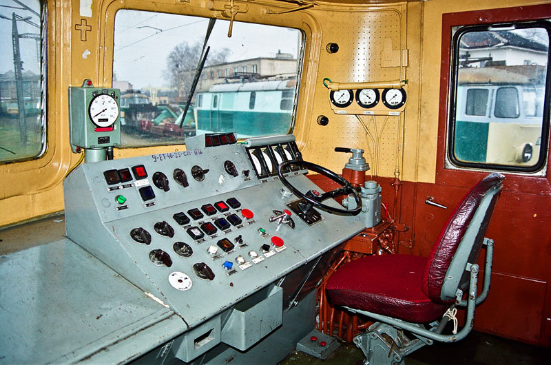 Kabina lokomotywy elektrycznej ET40-25.